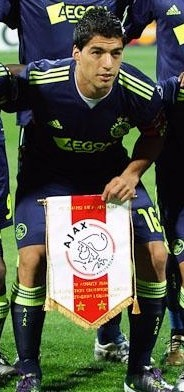 Luis Suarez